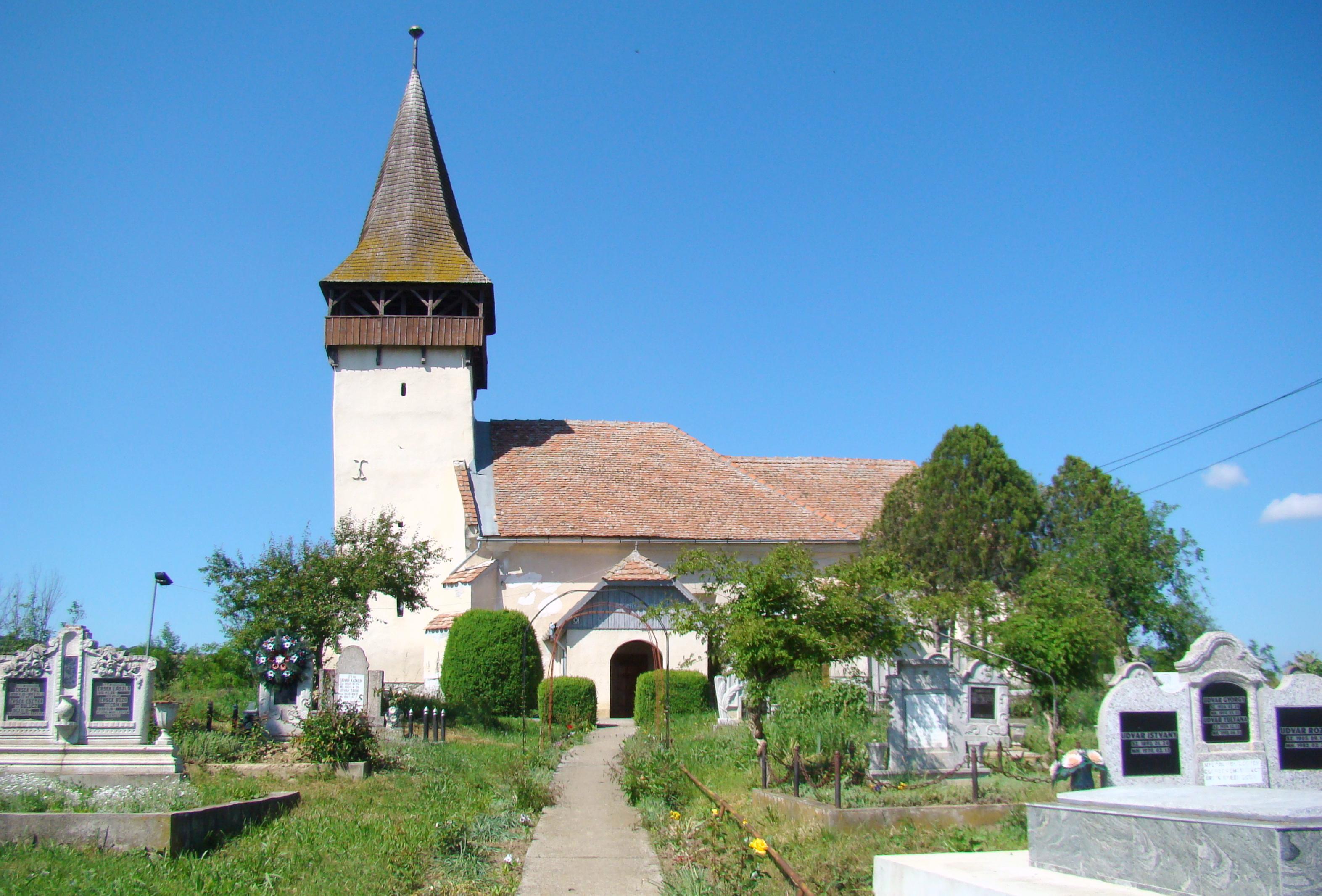 Biserica unitariană, sat Sânmiclăuș; comuna Șona